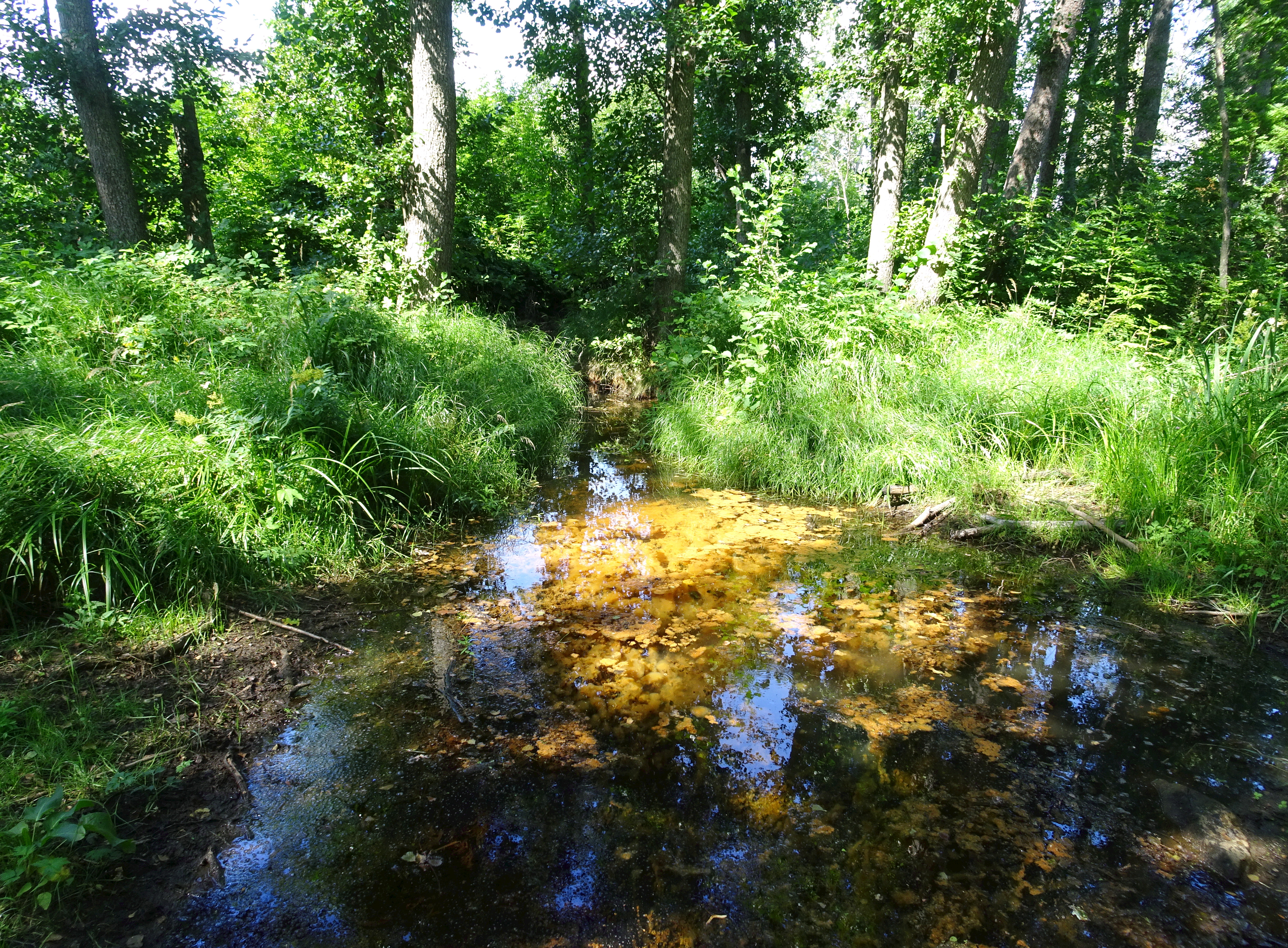 Taxinge, Drottningkällan